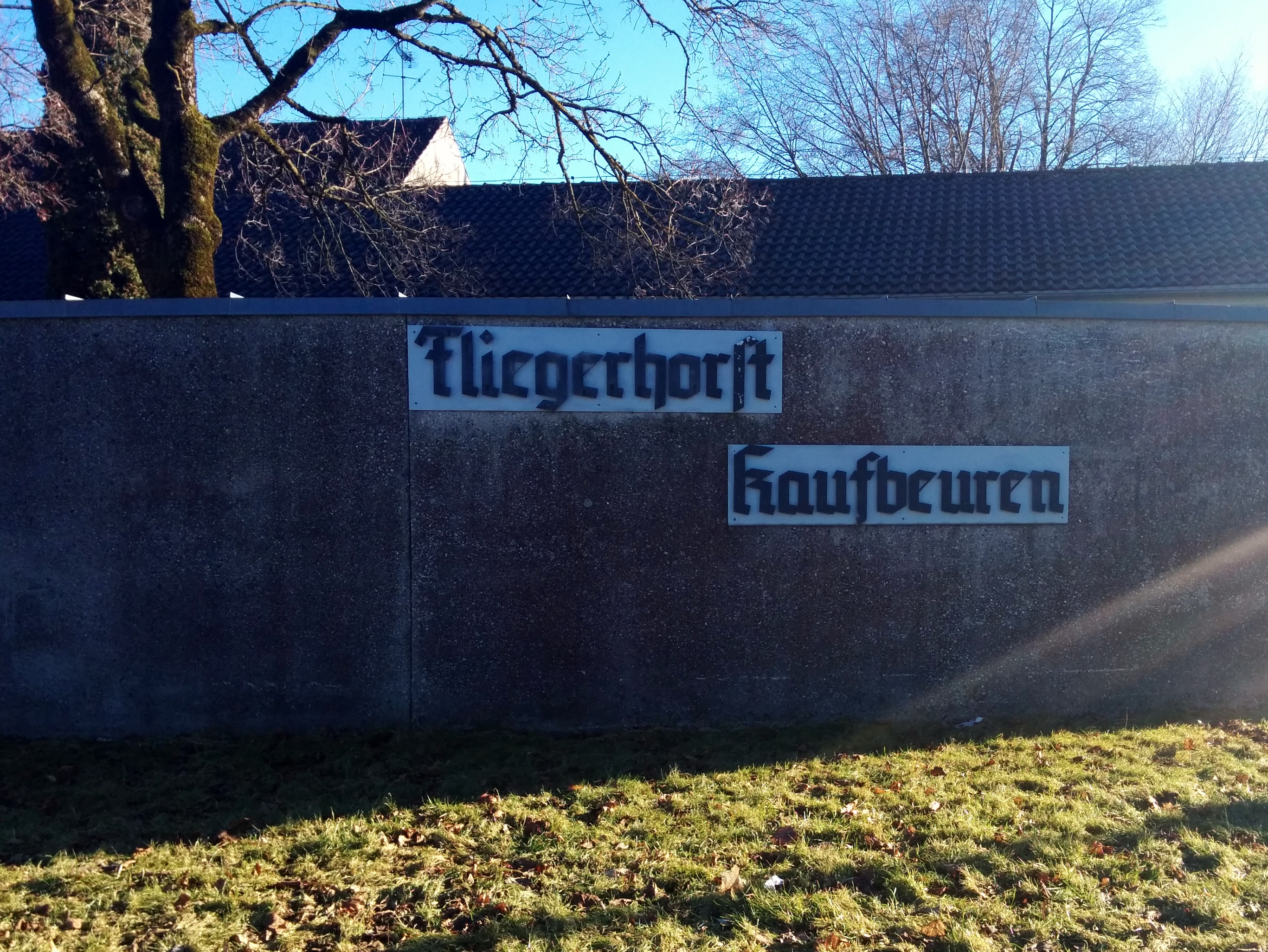 Beschriftung am Eingang des Fliegerhorst Kaufbeuren